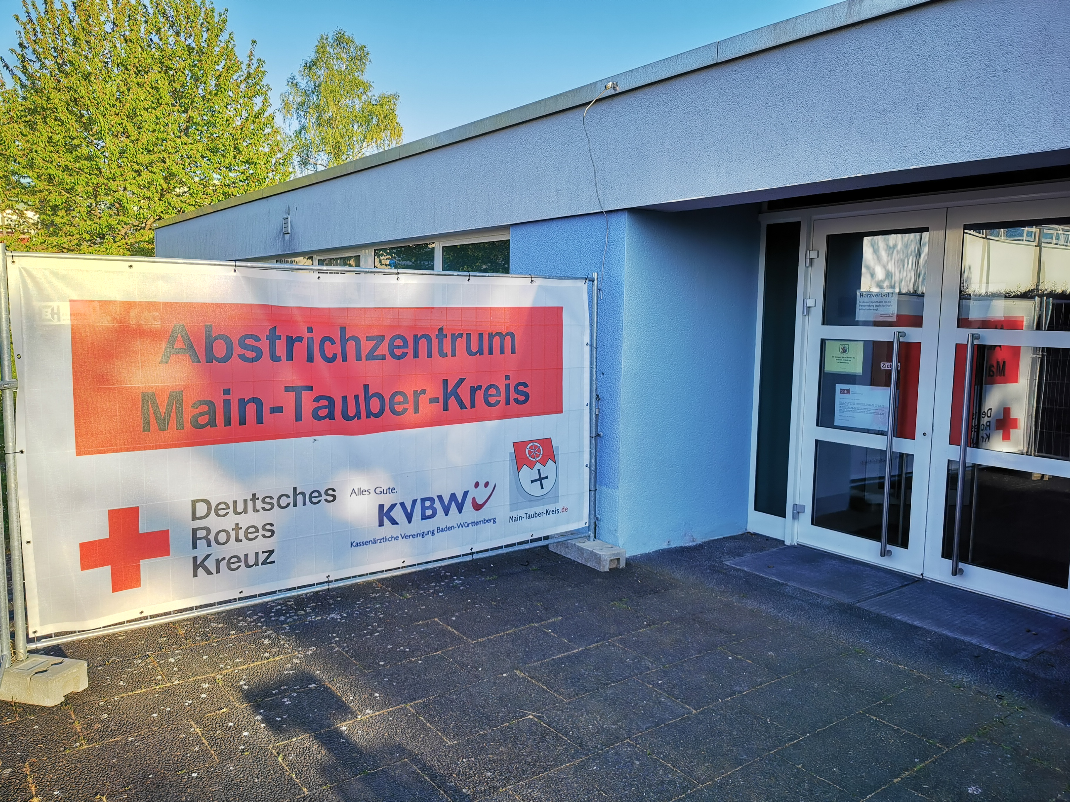 Zentrales Abstrichzentrum des Main-Tauber-Kreises in der Kreisstadt Tauberbischofsheim während der COVID-19-Pandemie im Main-Tauber-Kreis